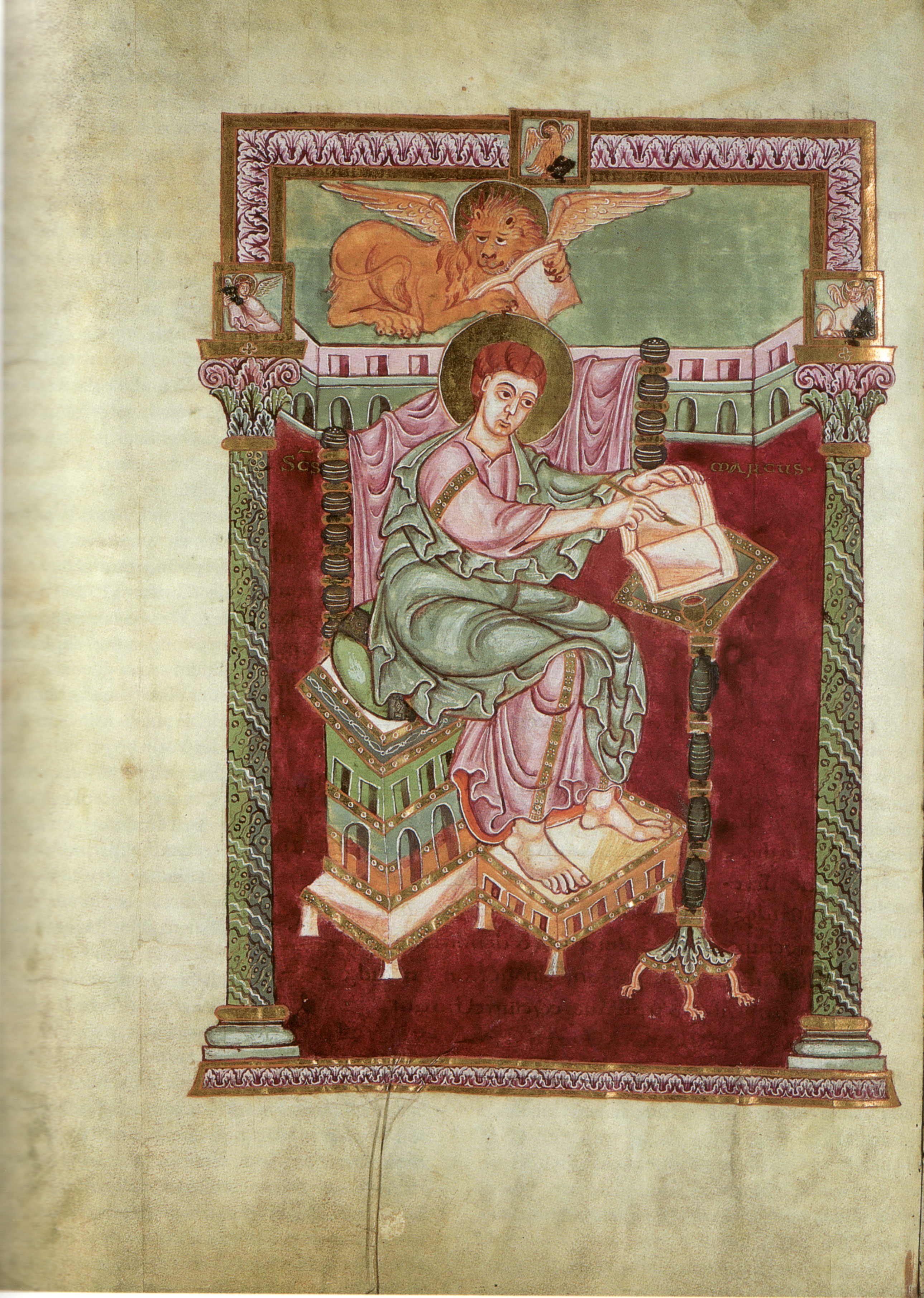 Evangelist Markus. Codex Wittekindus, Berlin, Staatsbibliothek, Ms. theol. lat. fol. 1, fol. 45v